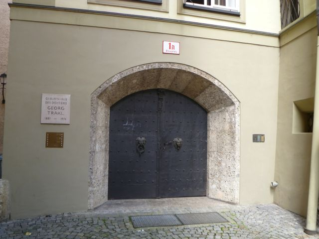 Trakl-Haus_in_Salzburg